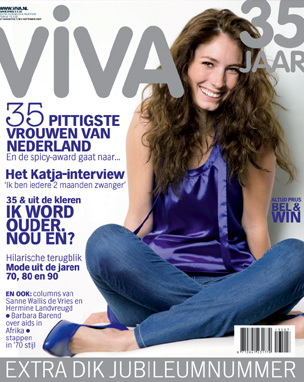 Cover van Viva jubileumnummer 35